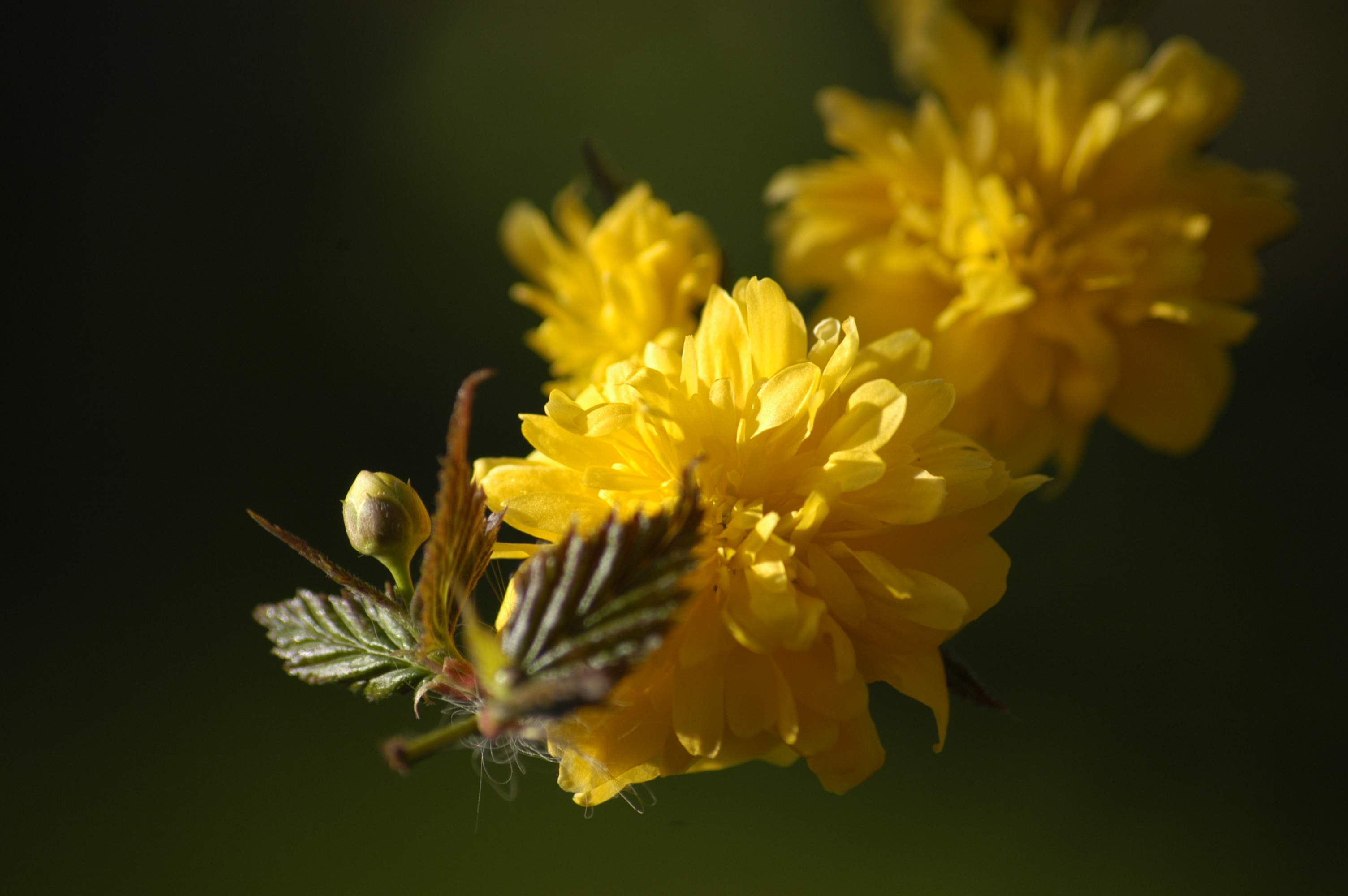 Kerria japonica Pleniflora (en) Kerria, flowers (de) Kerria, Blüten Place/Ort: Switzerland